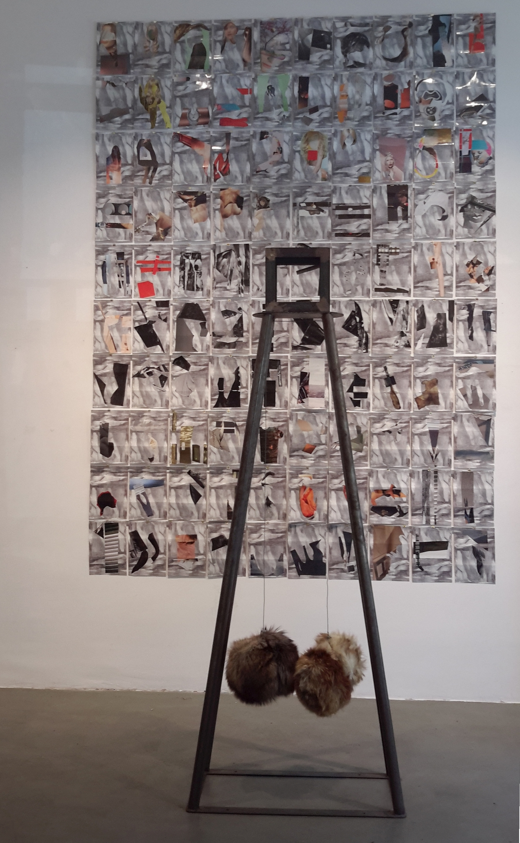 Cora Fisch, Berlin. Skulptur–Installation Quadratur des Pelzes. Galerie Z22 (White Cube), Berlin. Vernissage am 3. Mai 2018.